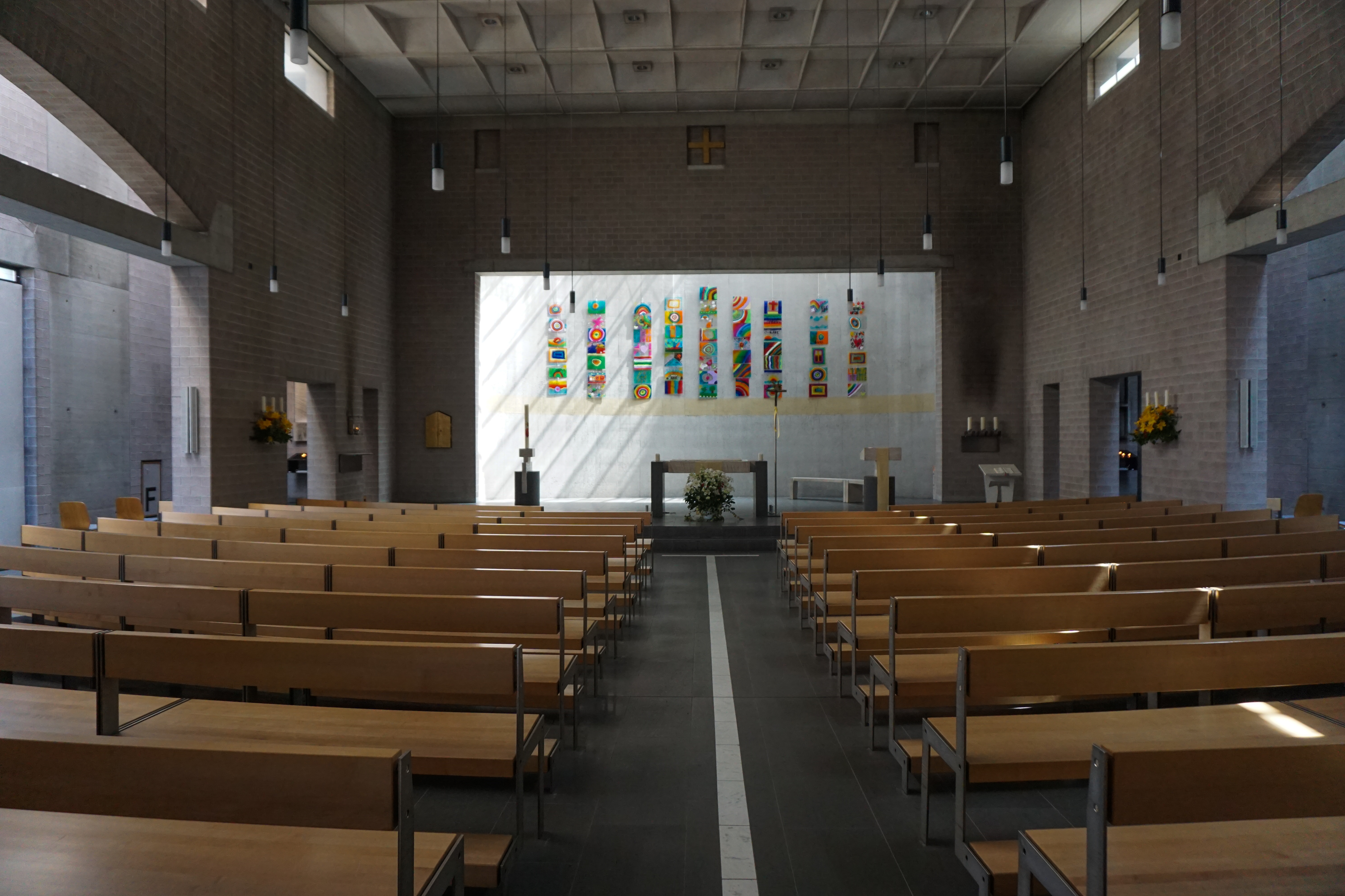 Inneres gegen Altar